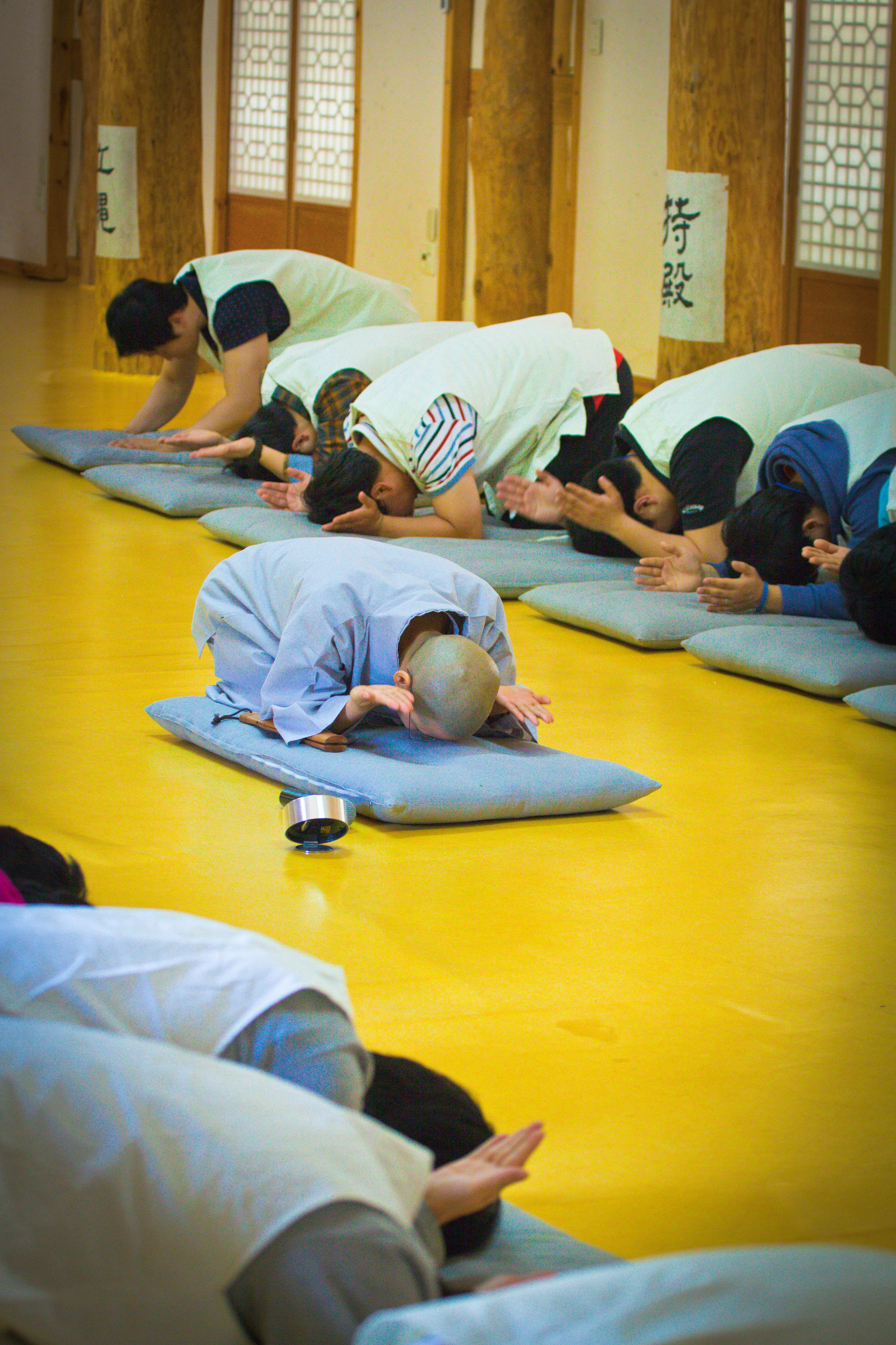 108배를 하고 있는 사진